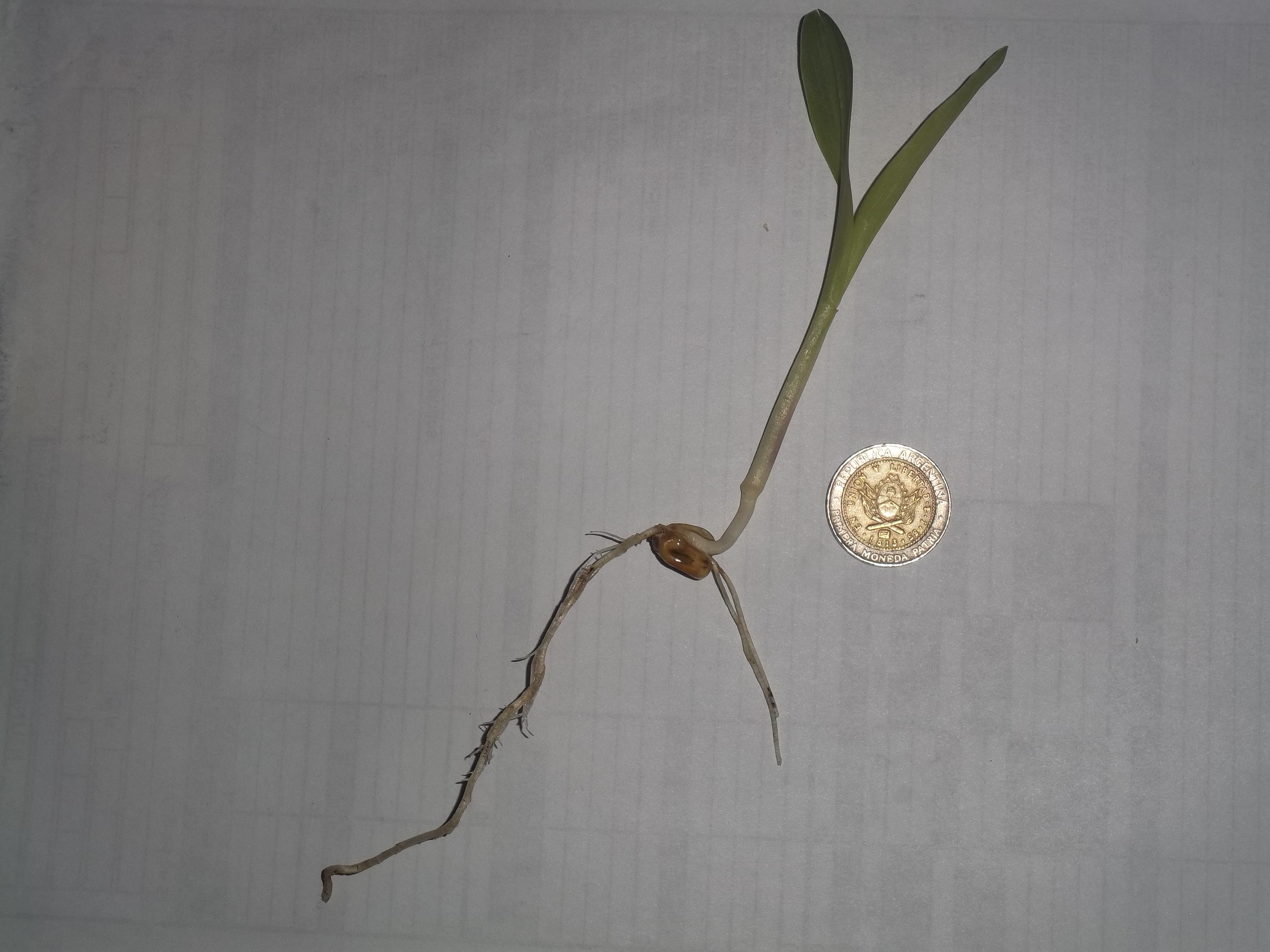 Maíz germinado. La moneda permite darse una idea de su tamaño.